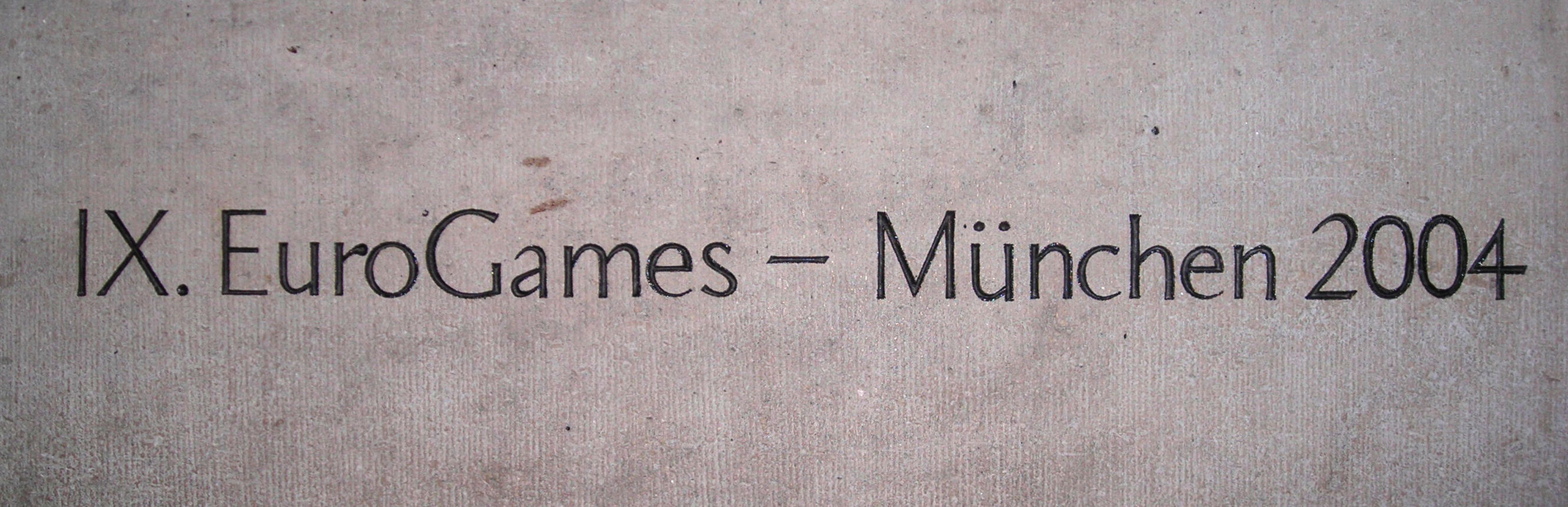 Eurogames Munich 2004 (Neues Rathaus München, Durchfahrt, Zugang vom Marienplatz)